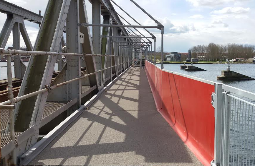 Cykel- og gangbro påhæftet jernbanebroen over Limfjorden mellem Aalborg og Nørresundby